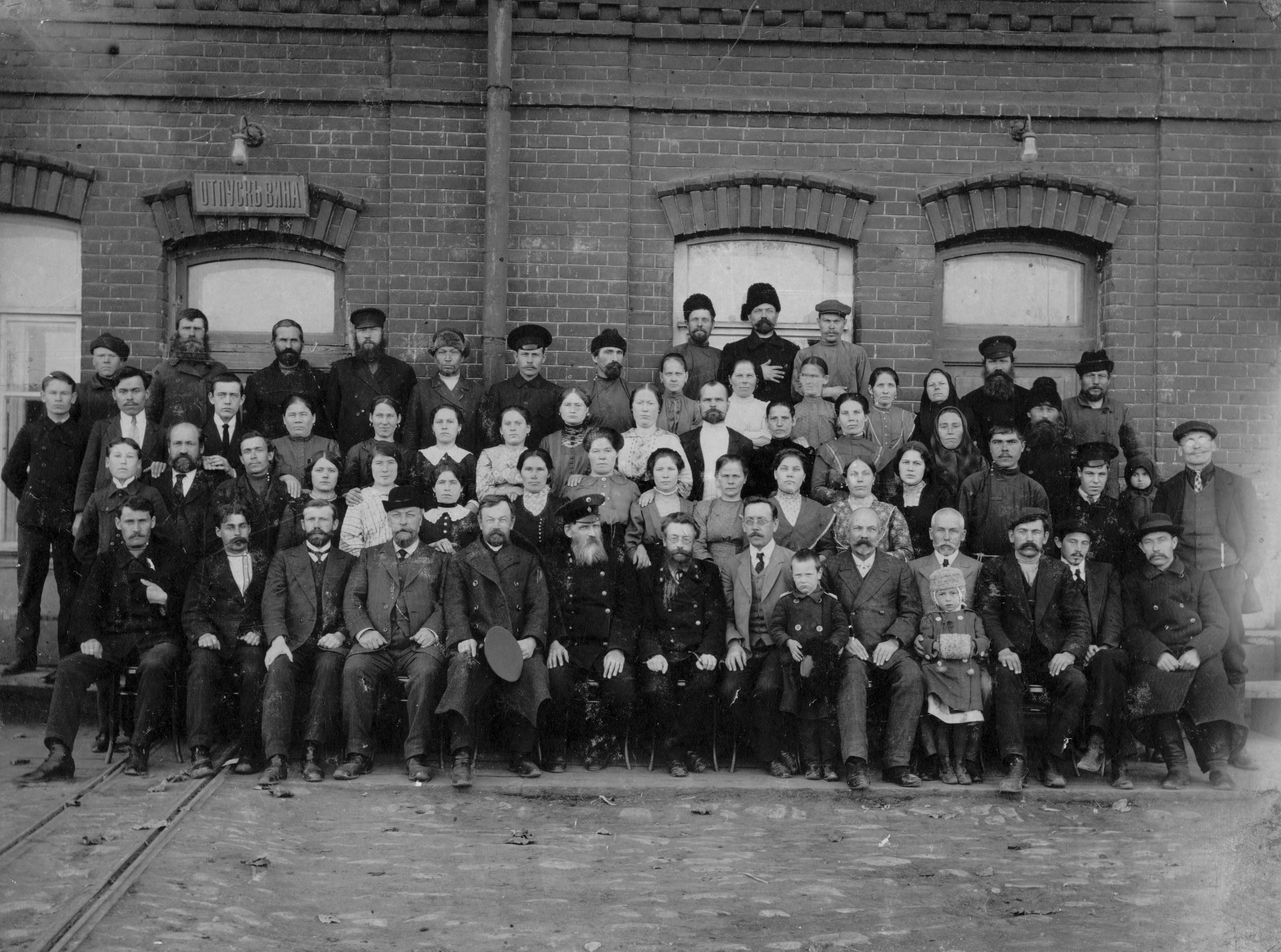 Служащие и рабочие СЛВЗ XIX век